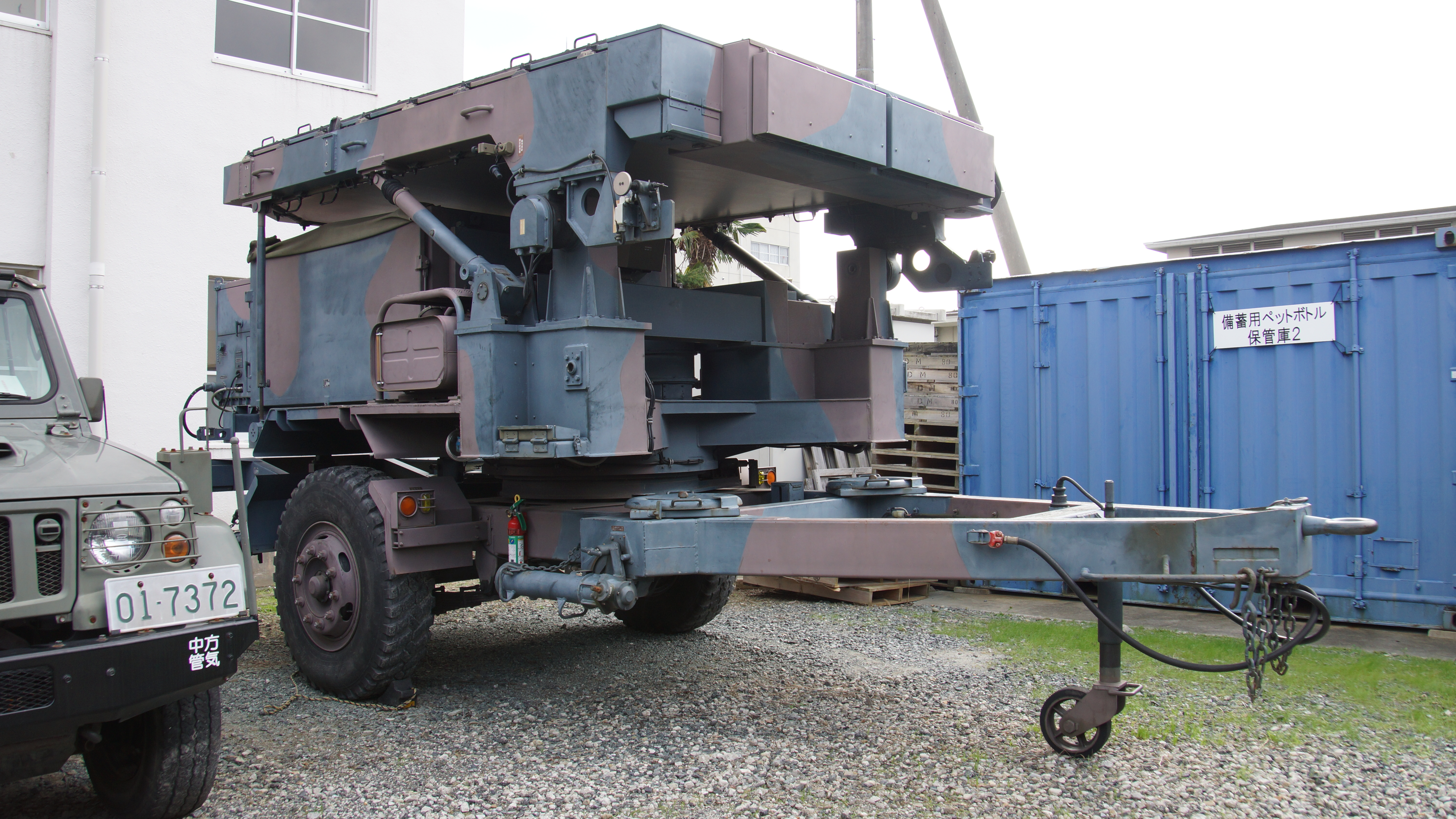 陸上自衛隊 精測進入レーダ装置JMPN-P22（79-5704号車） 右前面。2017年11月4日 明野駐屯地にて。